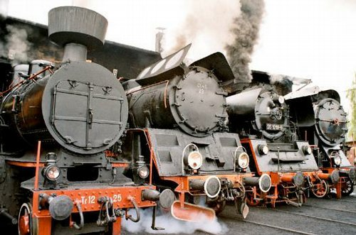 Parowozownia Wolsztyn (Szopa - hala wachlarzowa)